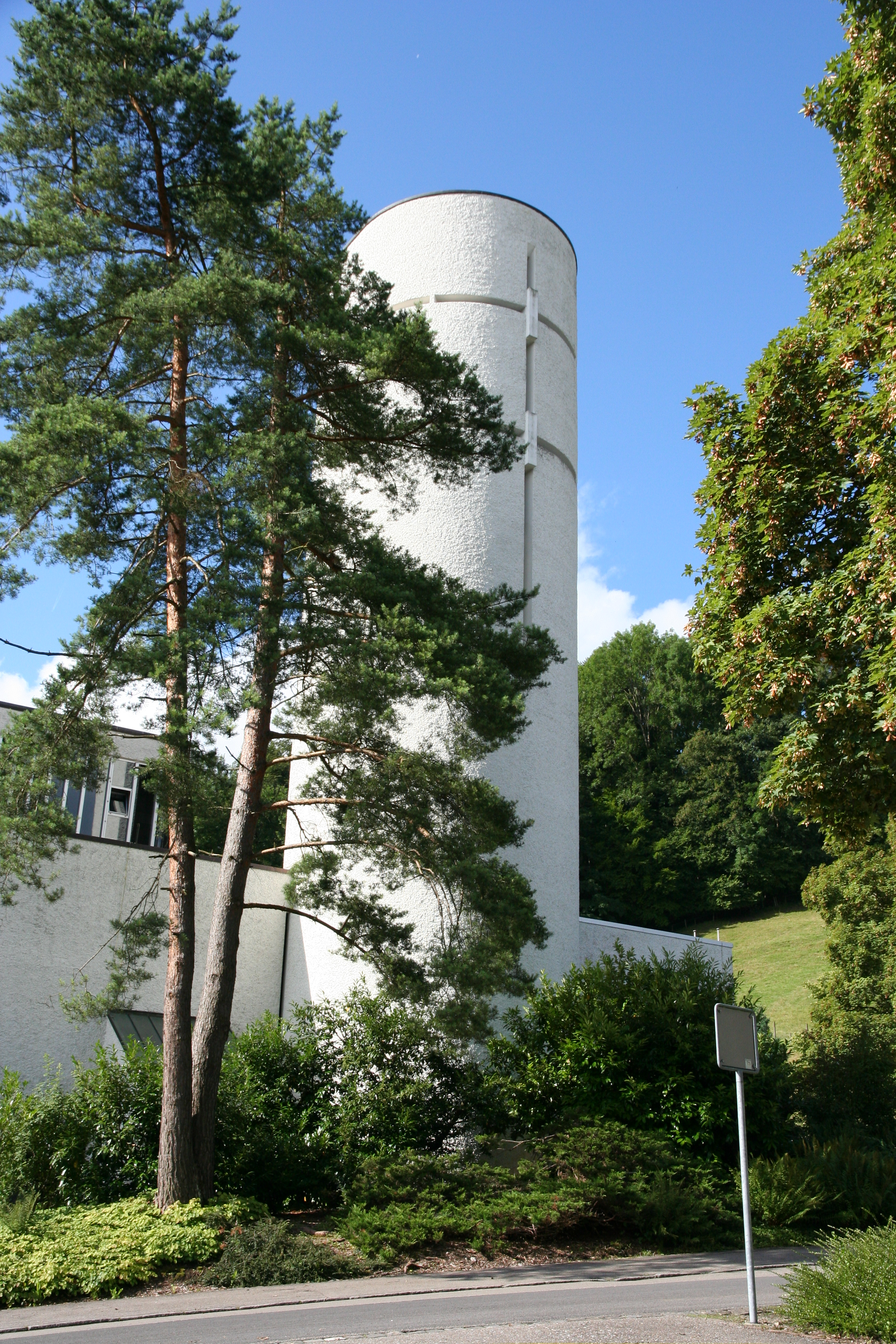 Römisch-katholische Pfarrkirche St. Marien Langnau ZH